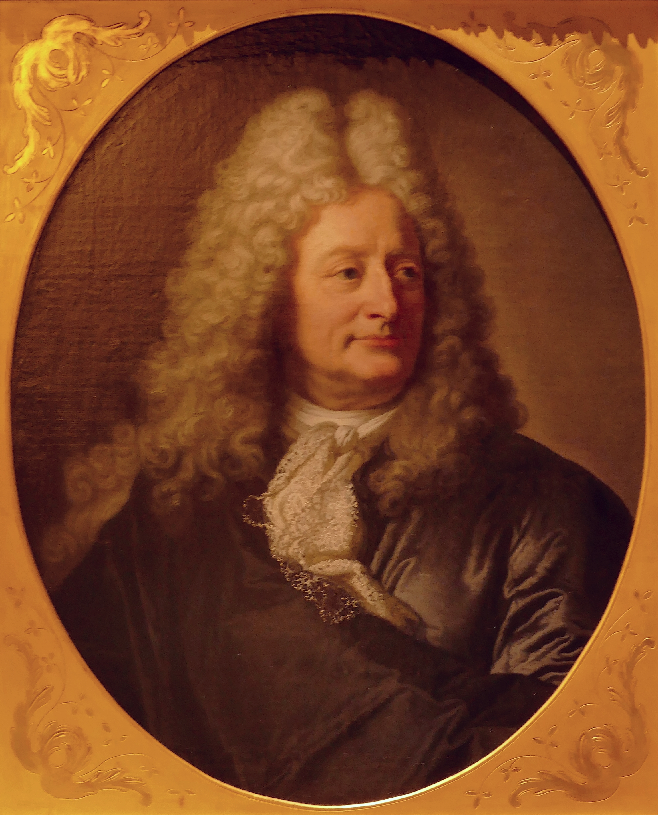 Portrait de Nicolas Delaunay par Hyacinthe Rigaud, 1712-1713, huile sur toile (hauteur 60 cm environ). Musée de la Monnaie, 11 quai de Conti, Paris. Ref : PAR 0759.